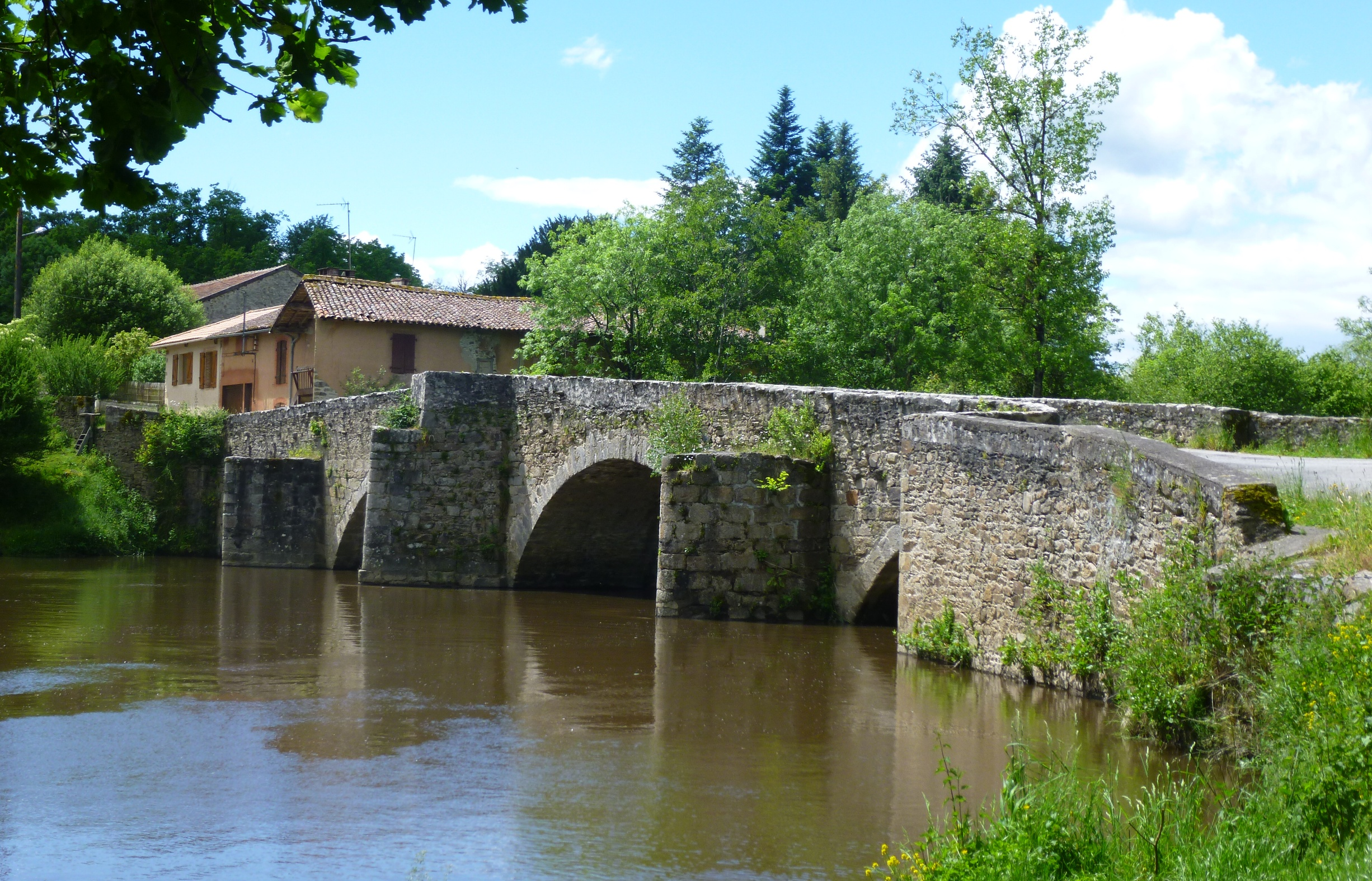 Pont gothique de Beissat